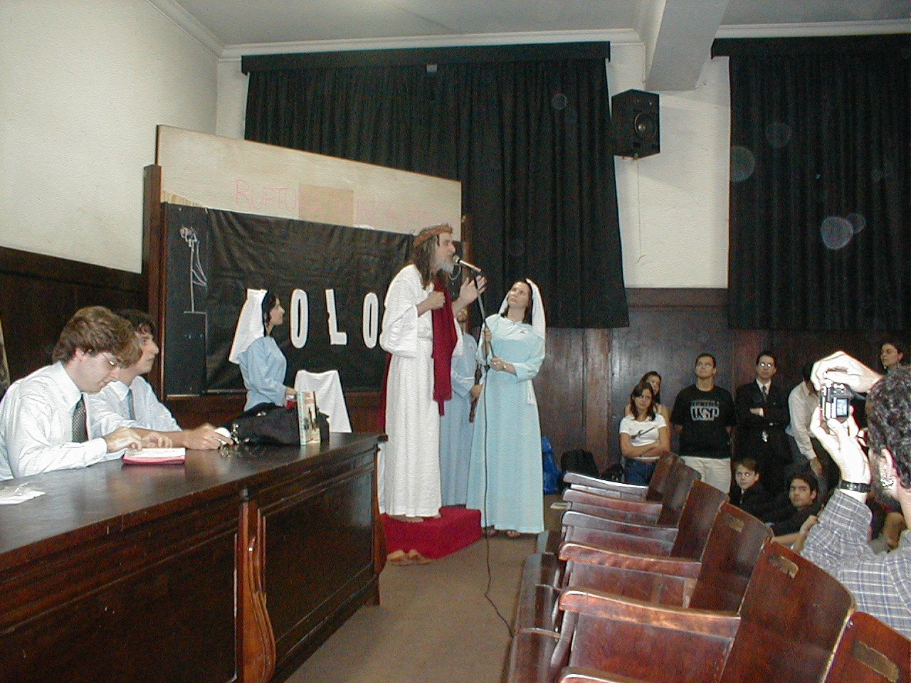 Inri Cristo na Faculdade de Direito da USP falando aos jovens.